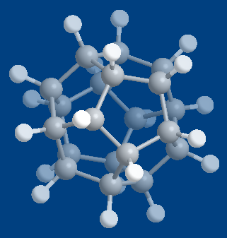 dodecahedrane